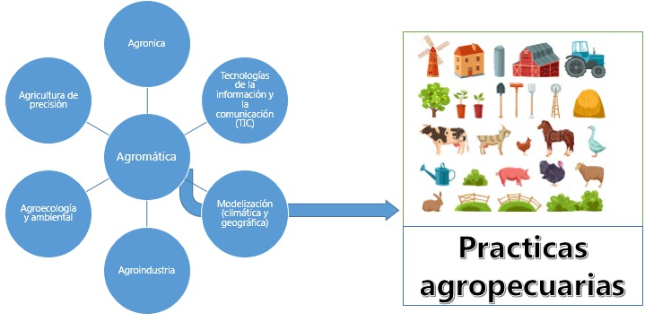 Ciencia que aportan a la Agromática